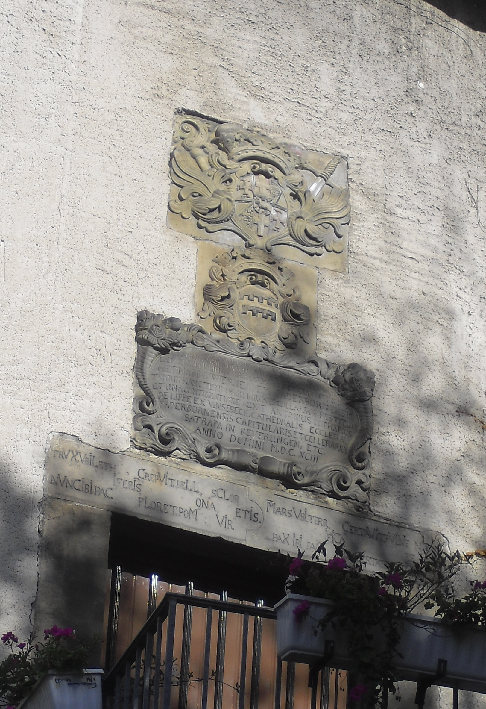 Supraporte an der Heiersburg in Paderborn Wappenstein oben: Wappen des Fürstbischofs Hermann Werner von Wolff-Metternich zur Gracht Wappenstein unten: Wappen des westfälische Adelsgeschlechts von der Lippe Inschrift